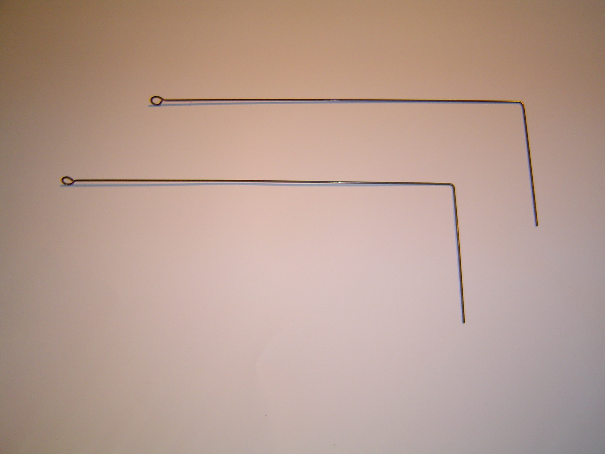 zelf gemaakte foto